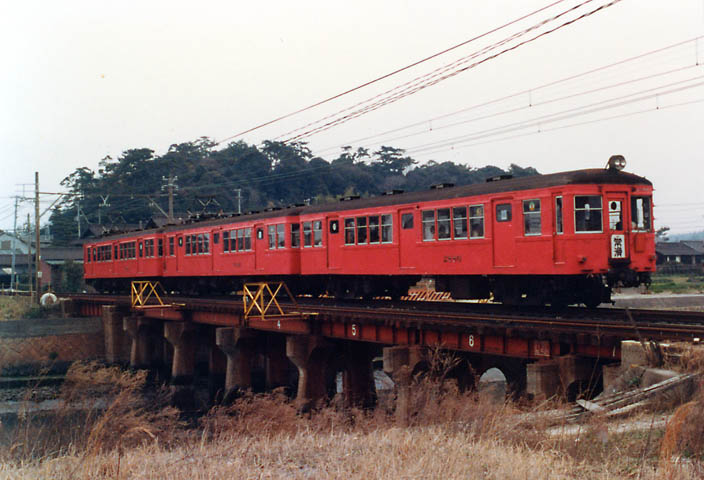 名鉄3880系3891編成。画像先頭の制御車ク2886は、東急在籍当時は制御電動車デハ3700形であったものを名鉄導入時に電装解除した車両で、前面貫通扉を備える点が異端であった。常滑線日長 - 新舞子間にて撮影。